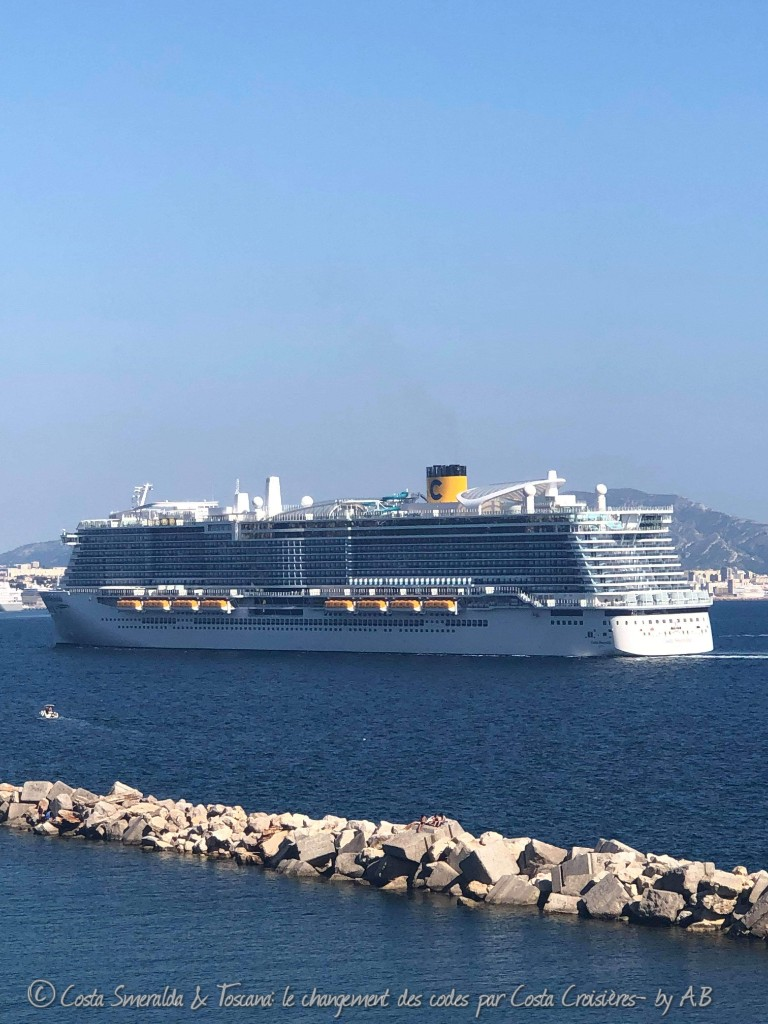 Arrivée du Costa Smeralda au terminal de croisières de Marseille